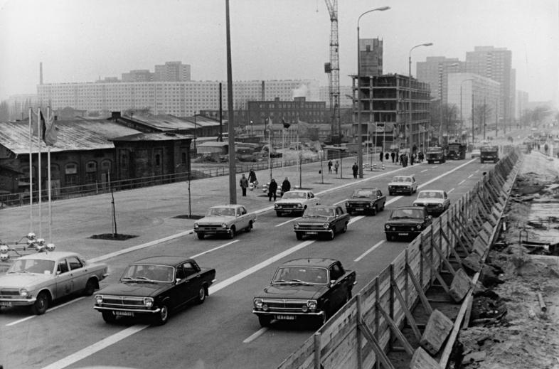 Berlin, Lichtenberger Brücke, Baustelle ADN-ZB Schneider 19-12-75 Berlin: Südteil der Lichtenberger Brücke übergeben-Über den Südteil der Lichtenberger Brücke in Berlin rollt seit dem Nachmittag des 19.12.75 der erste Verkehr. Kurz vor 14.00 Uhr wurde der 143 Meter lange Abschnitt des zur Zeit bedeutendsten Verkehrsvorhabens der DDR-Hauptstadt seiner Bestimmung übergeben.